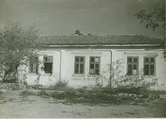 Начално училище в село Септемврийци, Добричко.